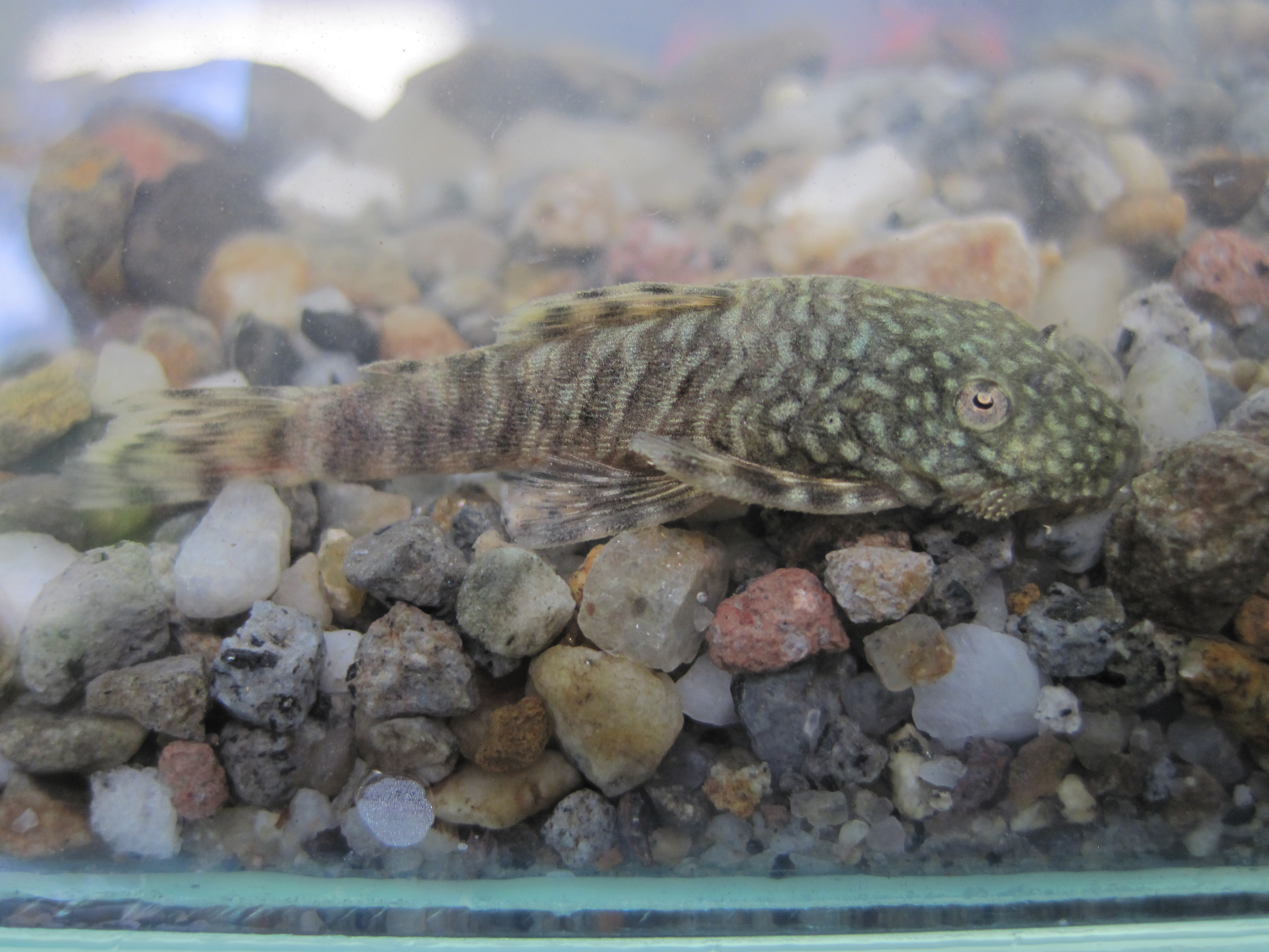 Ancistrus caucanus